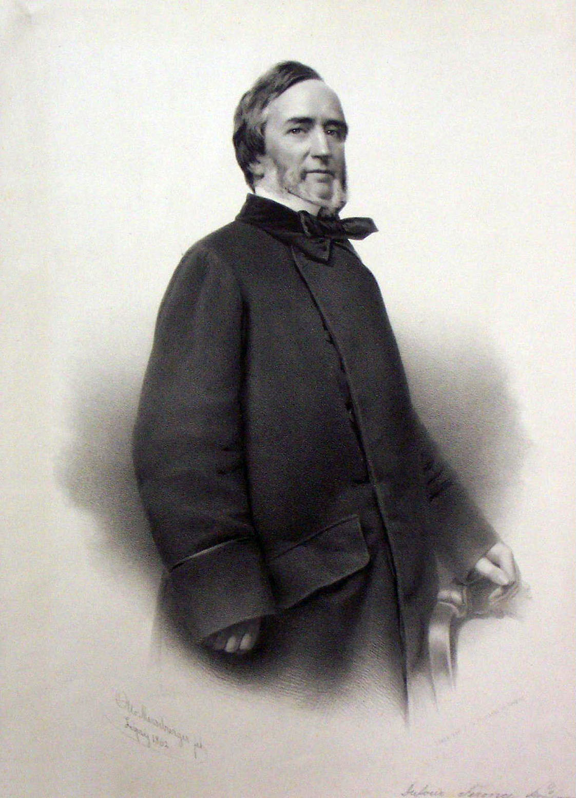 Bildnis des Kaufmanns Albert Dufour-Féronce, Lithographie von 1862